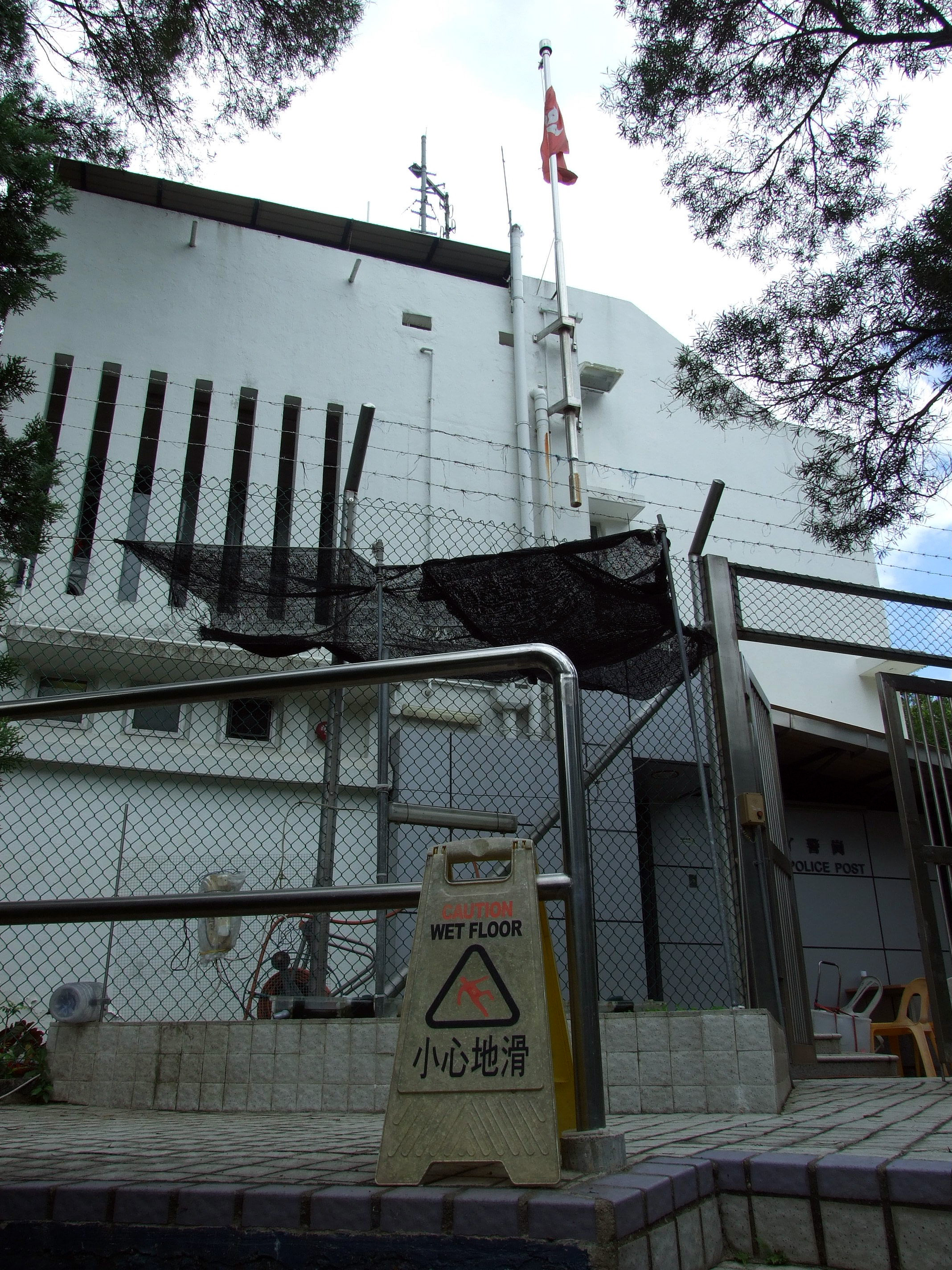 中文（香港）: 南丫警崗